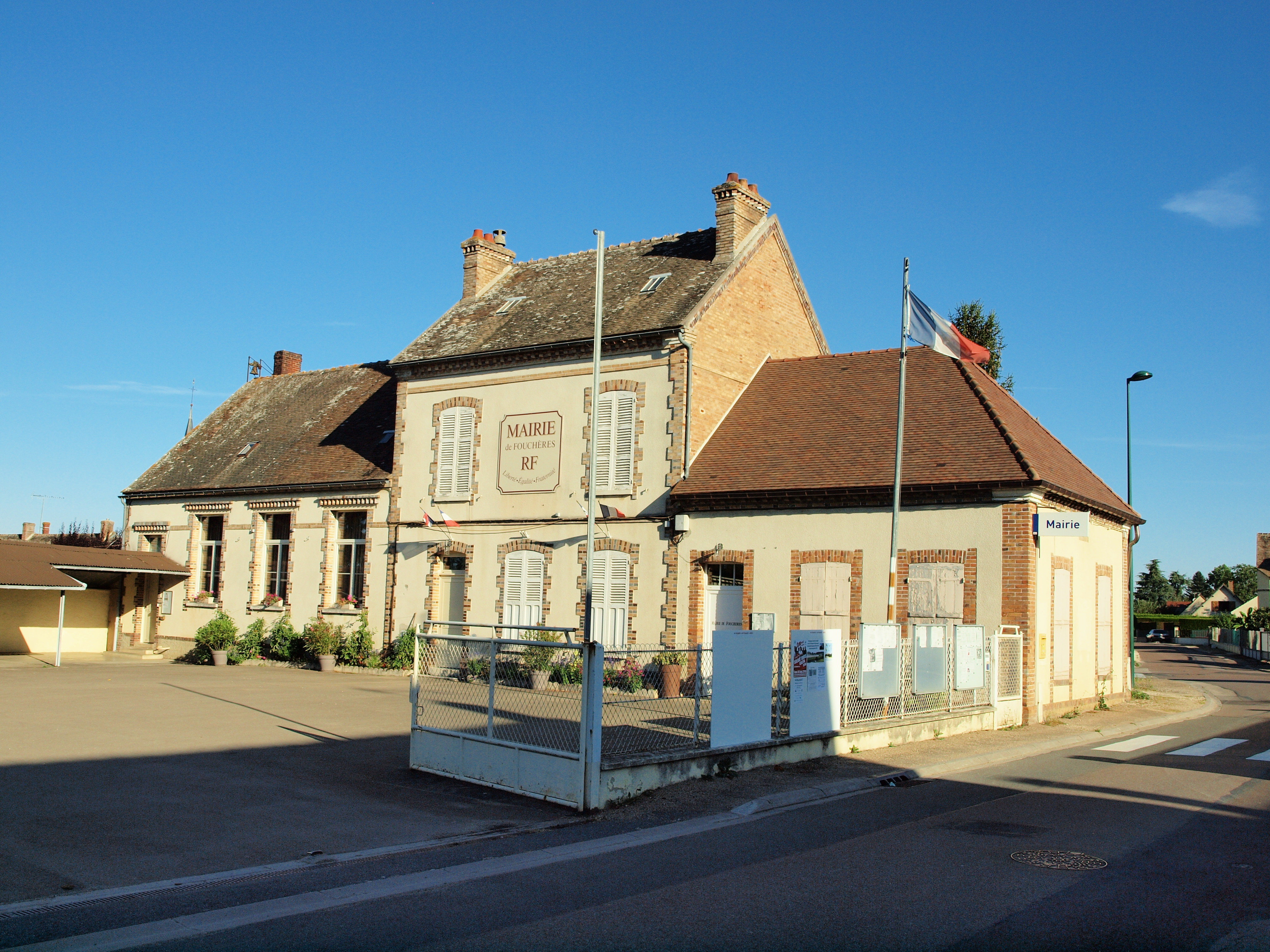 Fouchères (Yonne , France)